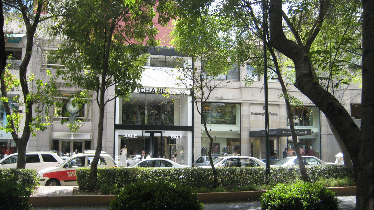 Foto de Masaryk